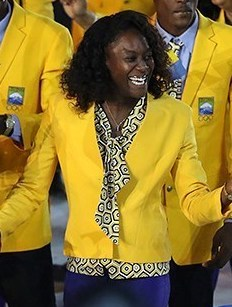 Делегация Барбадоса на открытии Летних Олимпийских игр 2016 в Рио-де-Жанейро